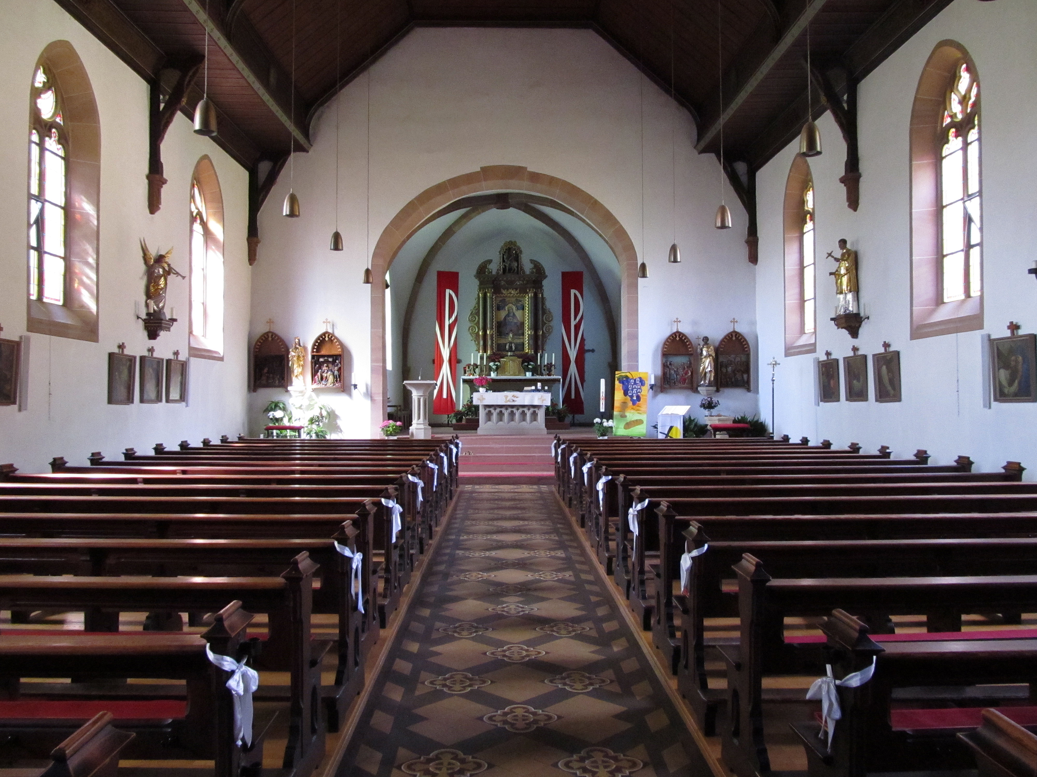 Blick ins Innere der katholischen Pfarrkirche St. Maritius in Erfweiler-Ehlingen, Gemeinde Mandelbachtal, Saarland